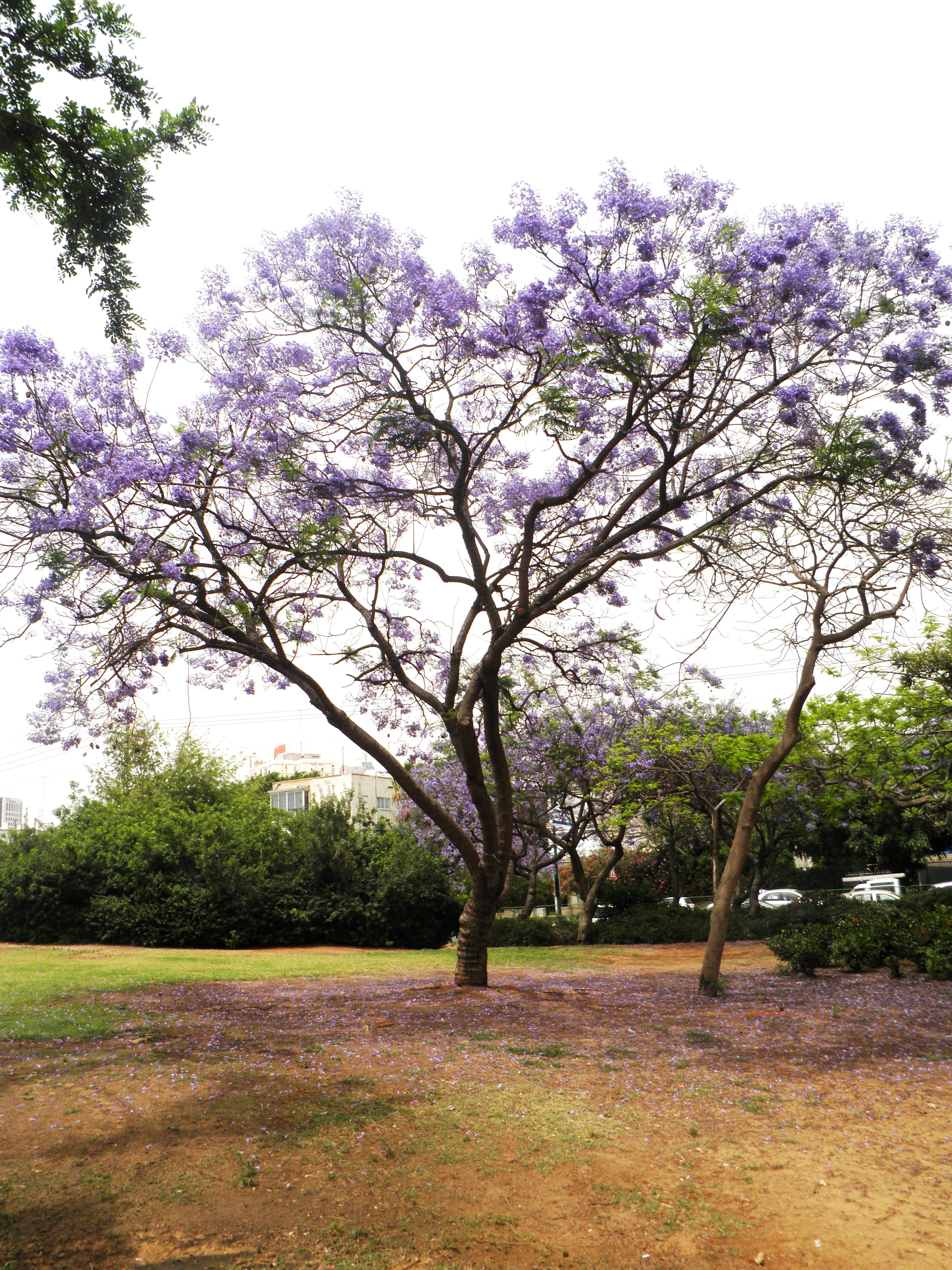 סיגלון חד-עלים